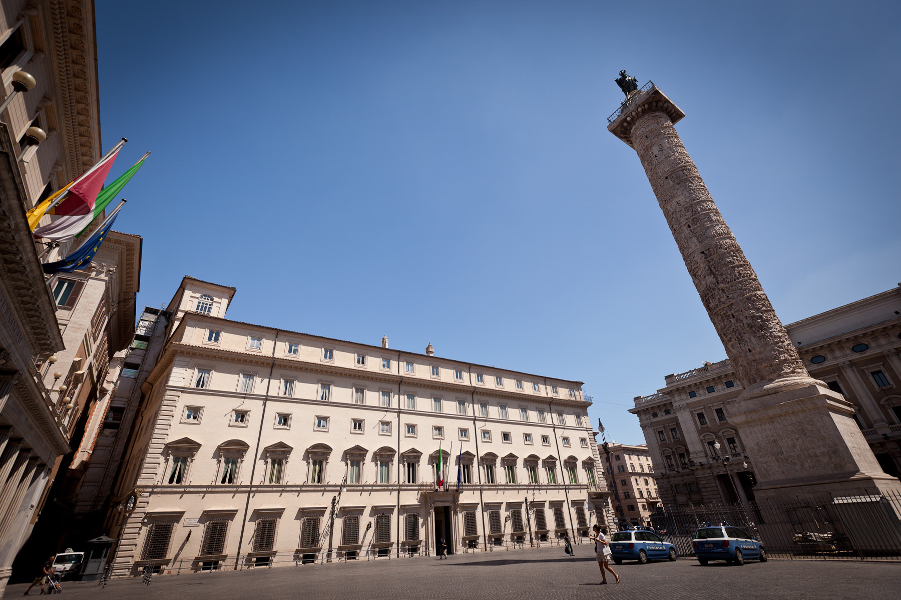 Roma